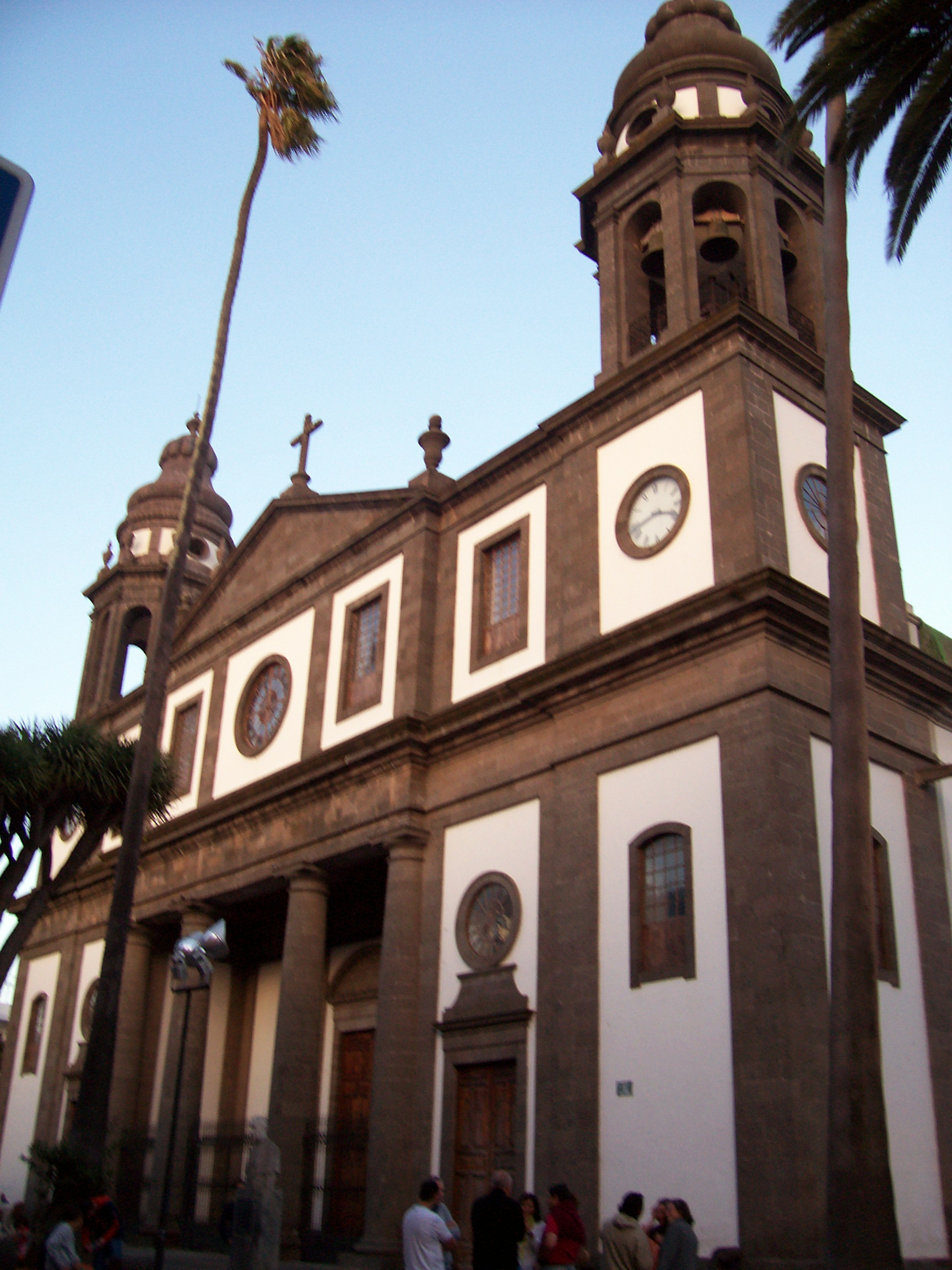 Catedral de La Laguna, Tenerife, Canarias.